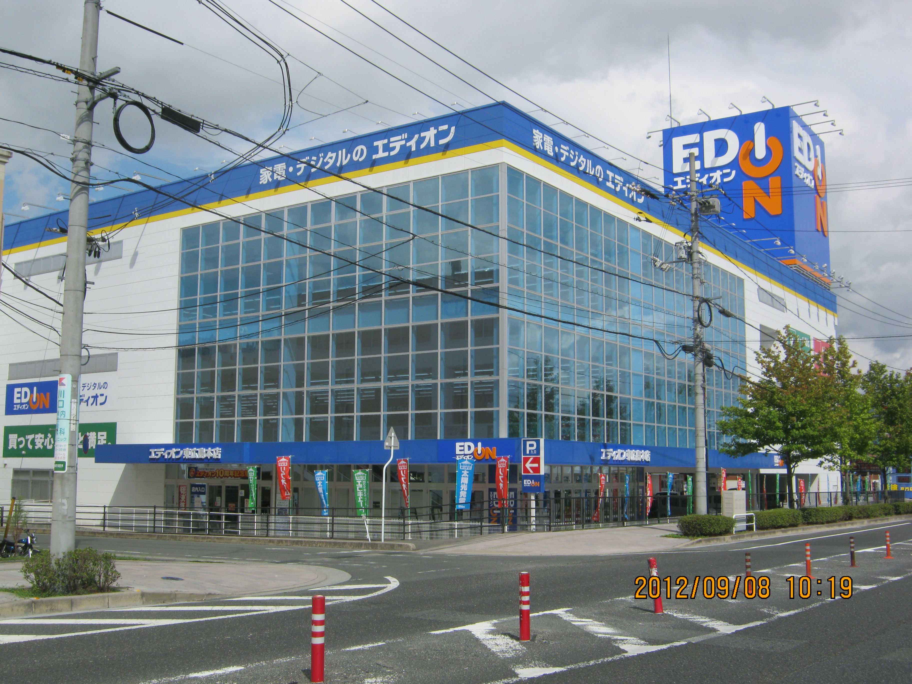 エディオン東広島本店（撮影時：デオデオ東広島本店）の看板架け替え工事終了後